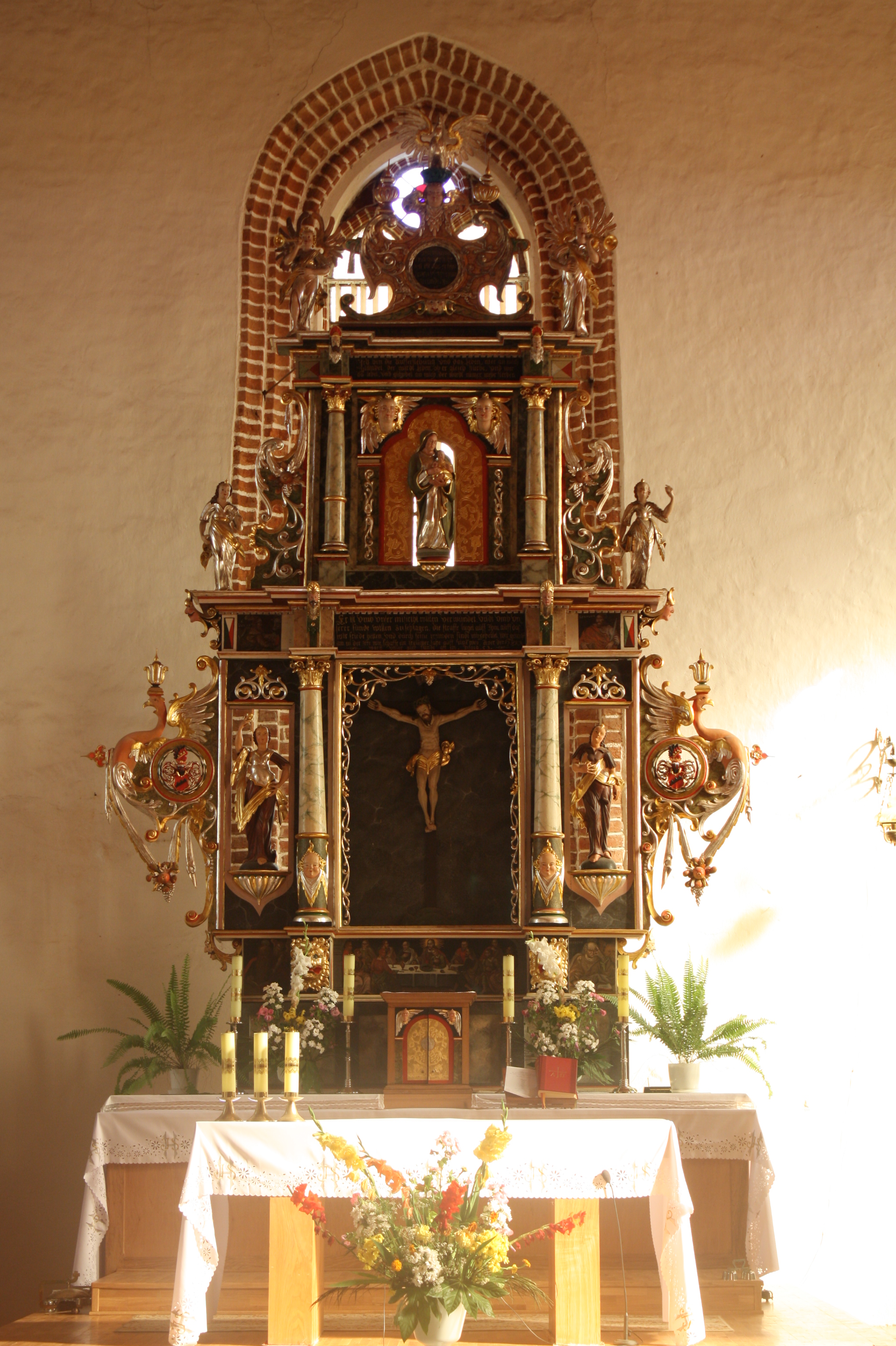 Barciany - wnętrze rzymskokatolickiego kościoła parafialnego p,w. Niepokalanego Serca NMP, 4 ćw. XIV, XVI, XVIII, XIX You can see all photographs in category Wikiekspedycja 2012. The making of this document was supported by Wikimedia Polska.